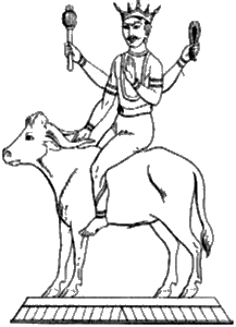 യമന്‍